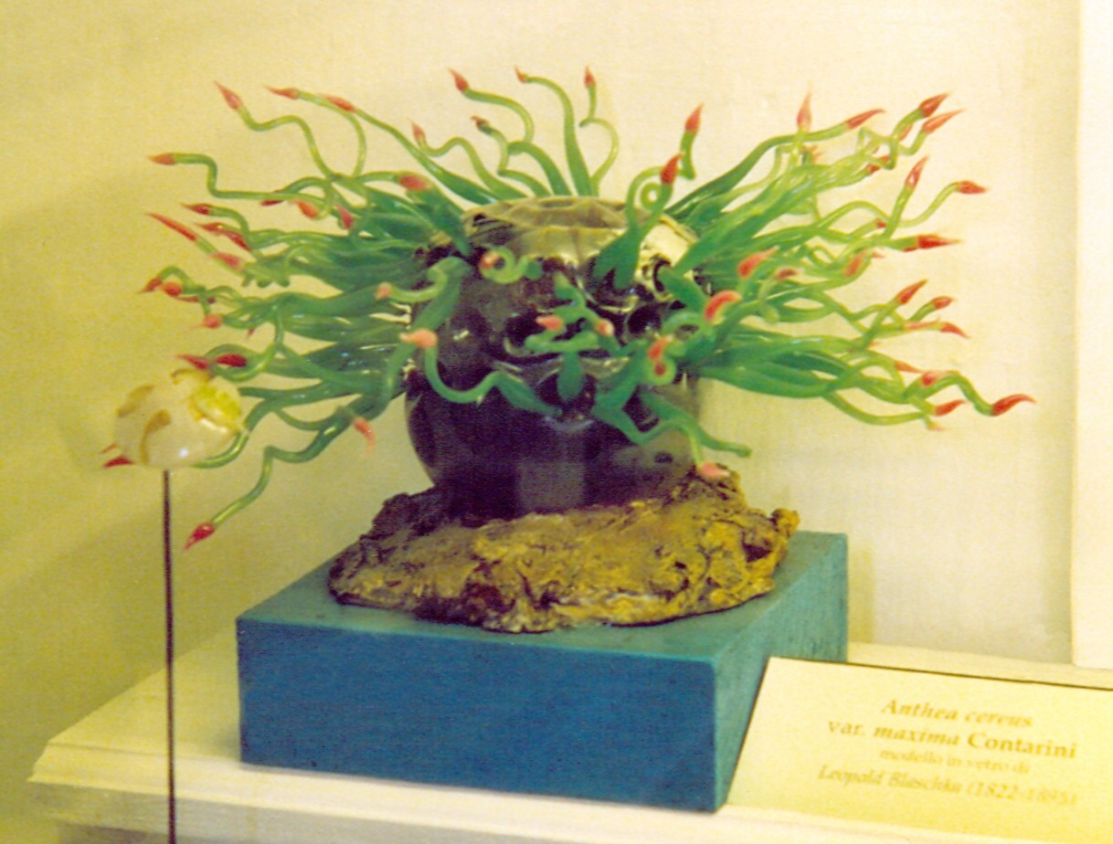 Sea anemone, glass object by Leopold Blaschka (1822 - 1895), Museo di Storia Naturale e del Territorio, Calci (Province Pisa), Italy